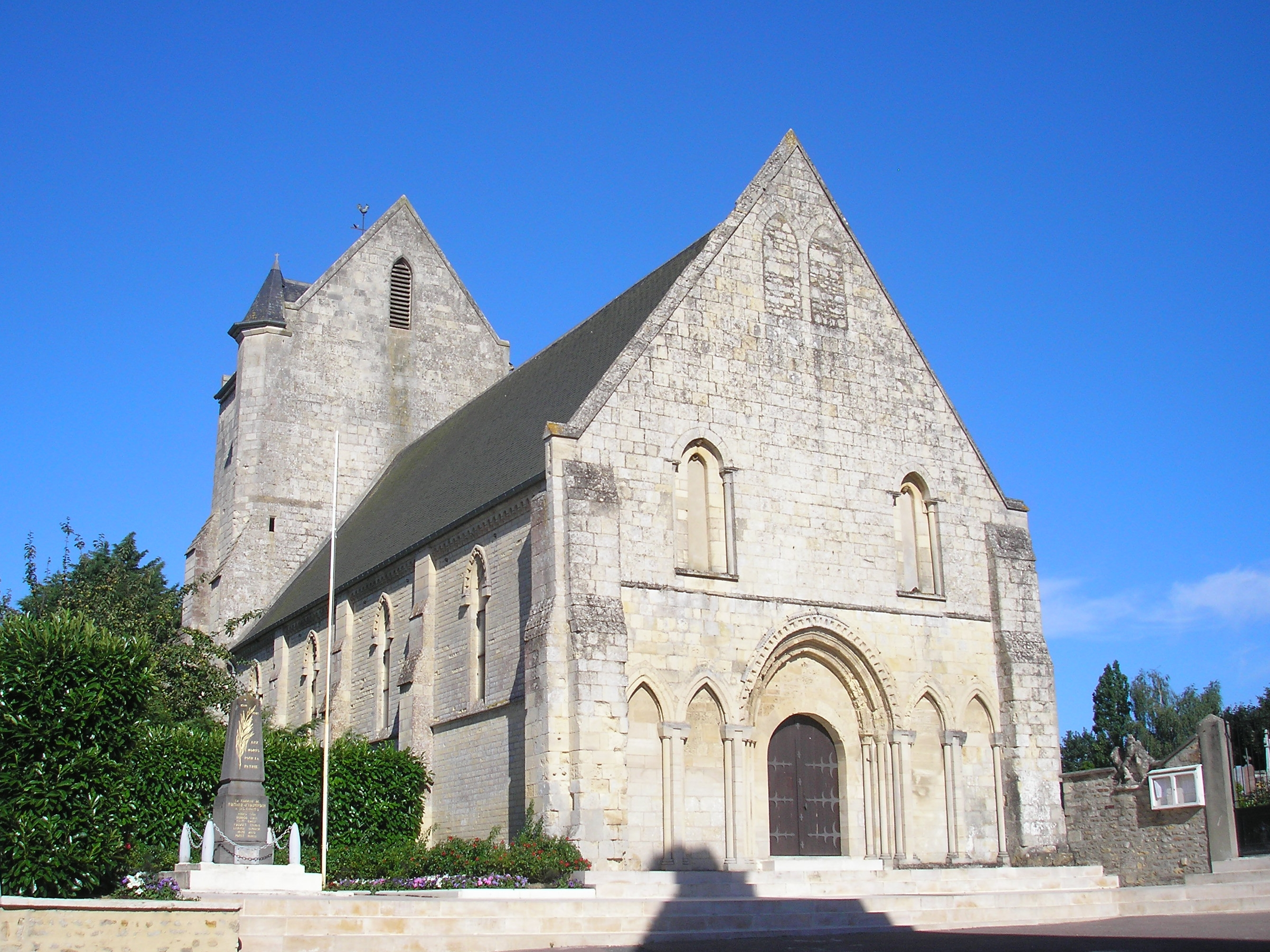 Fontaine-Étoupefour (Normandie, France). L'église Saint-Pierre.